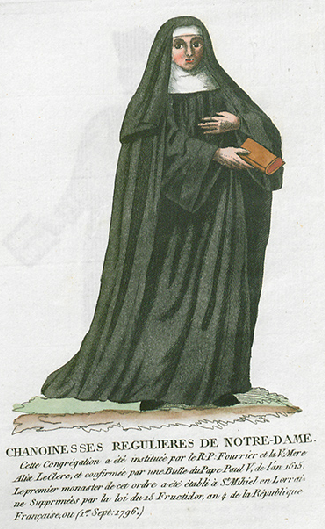 Collection de costumes de tous les ordres monastiques, supprimés à differentes époques, dans la ci-devant Belgique, Bruxelles, Philippe Joseph Maillart et sœur, 1811